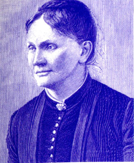 Maria Philippina van Bosse (1837-1900)